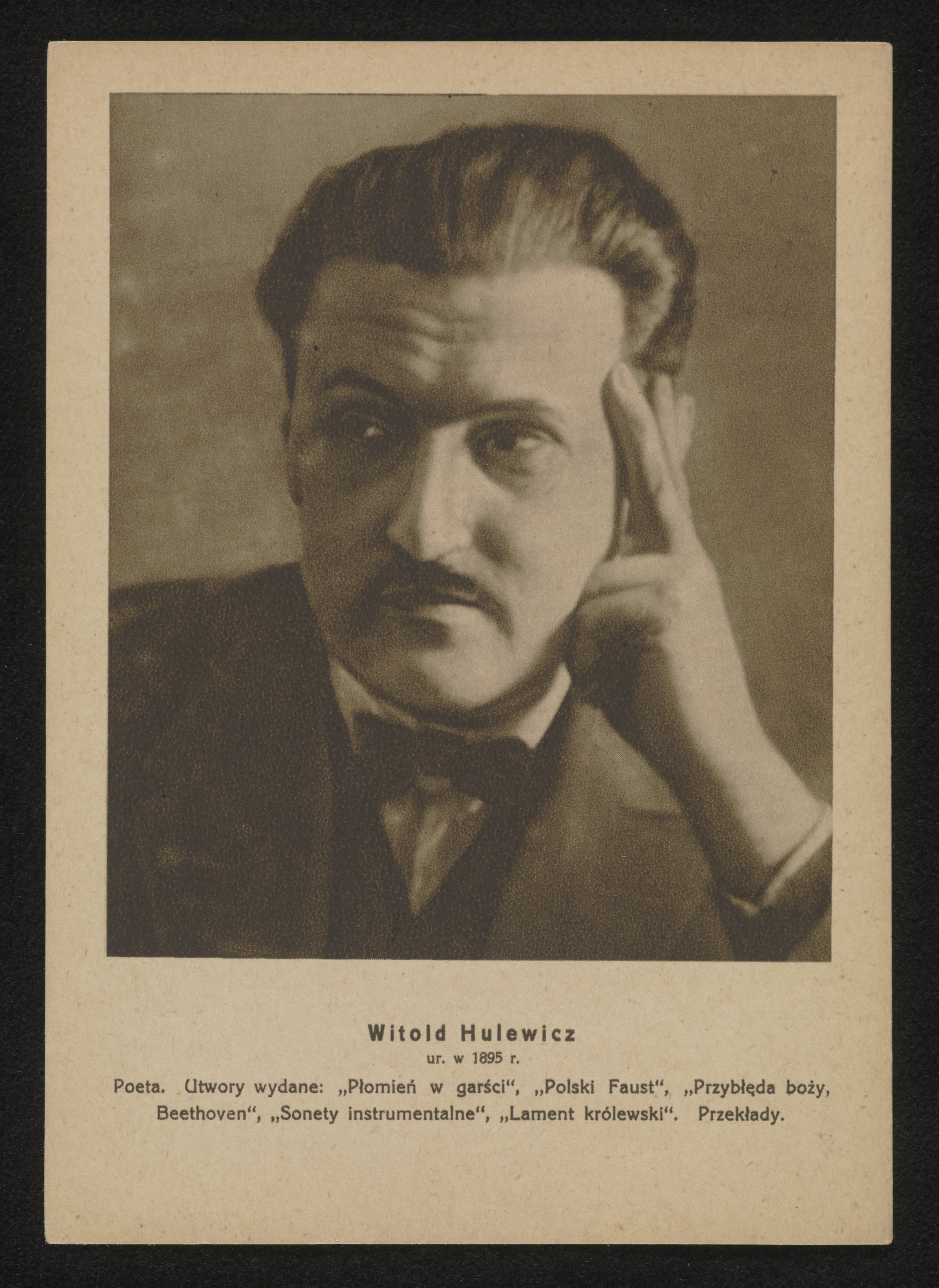 Witold Hulewicz : ur. w 1895 r. : poeta : utwory wydane: "Płomień w garści", "Polski Faust", "Przybłęda boży, Beethoven", "Sonety instrumentalne", "Lament królewski" : przekłady